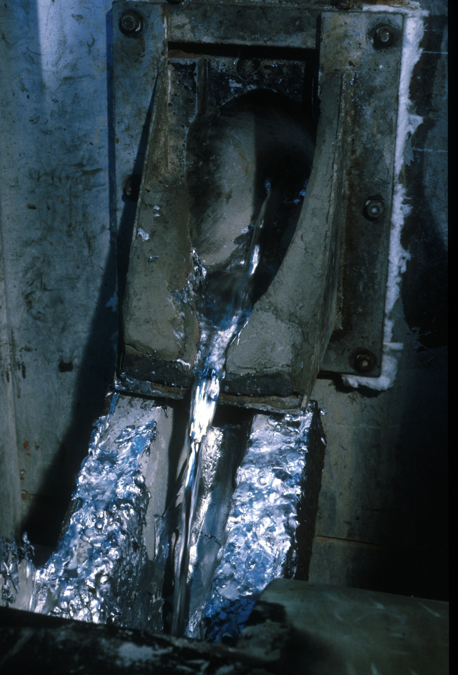 Molten metal prior to casting